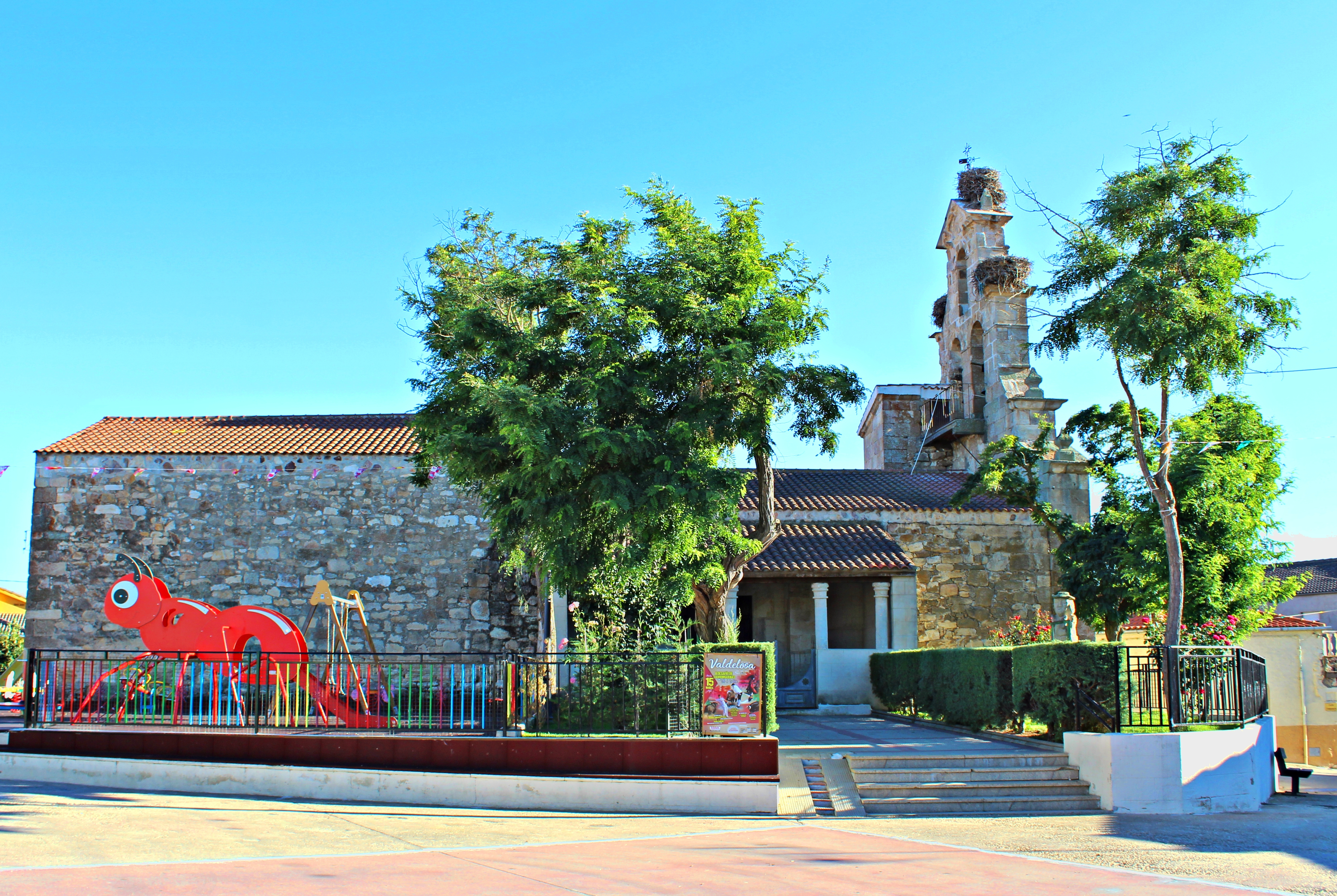 Zamayón, provincia de Salamanca